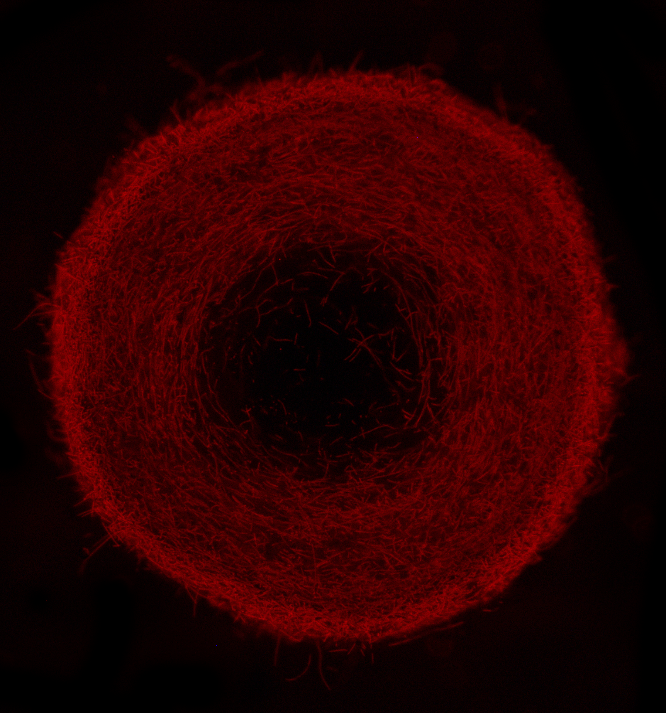 Cross section of a OPG under fluorescence light